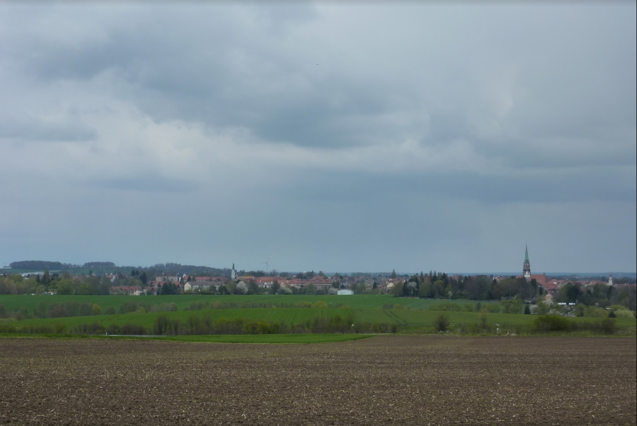 Nonnenberg Aussicht